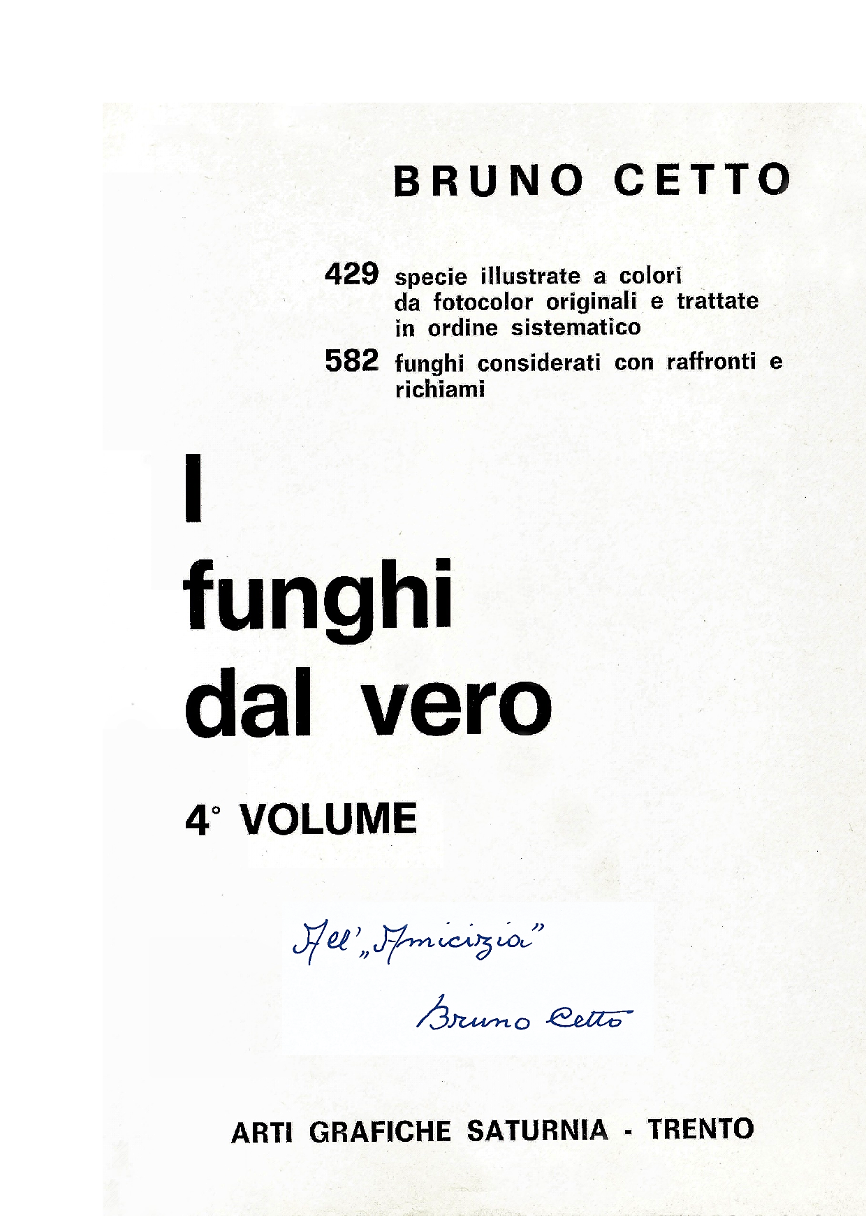 Bruno Cetto, I funghi dal vero 4 mit Widmung